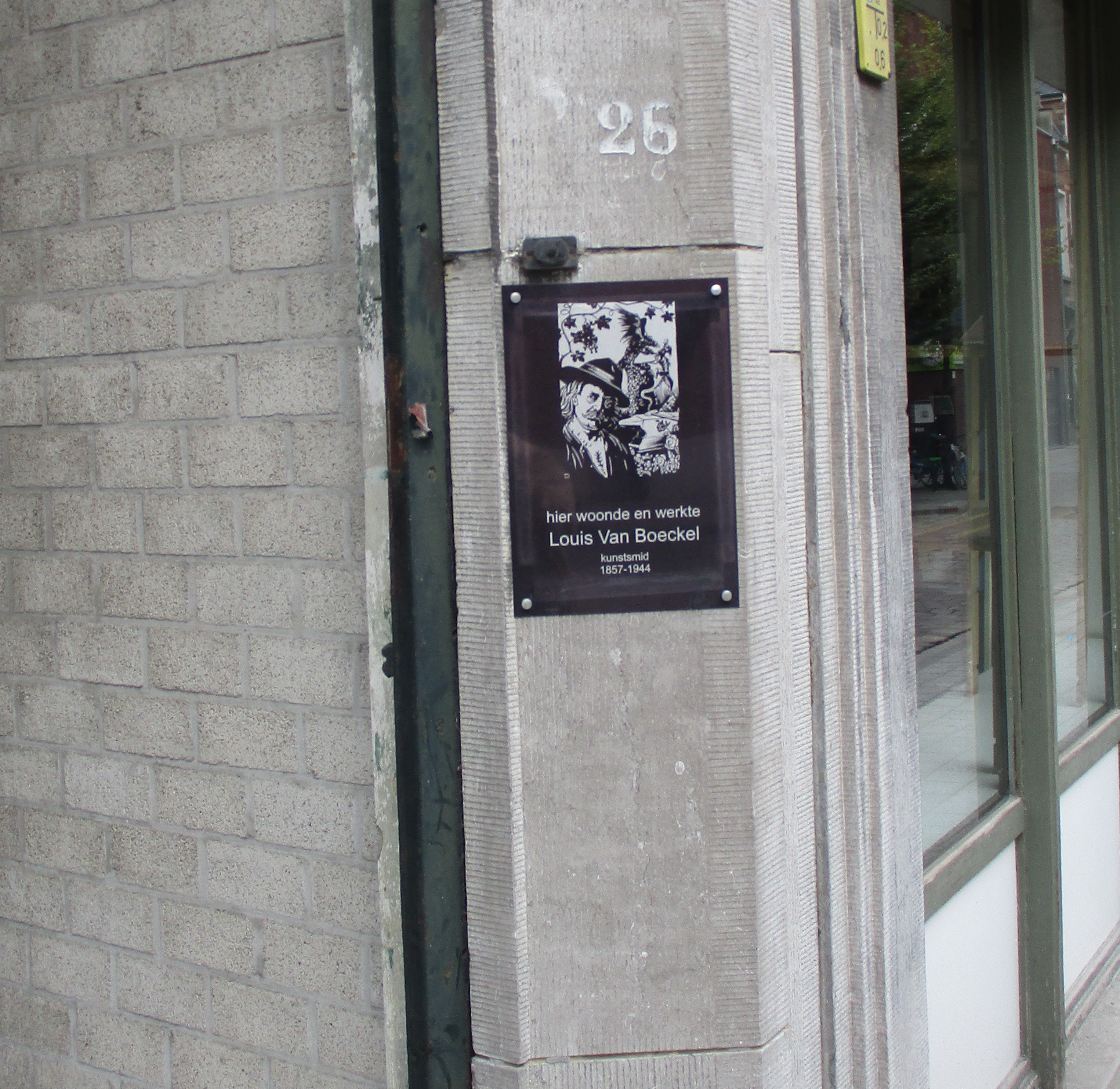 Herdenkingsplaat woon-en werkplaats Louis Van Boeckel te Lier, Florent Van Cauwenberghstraat 26